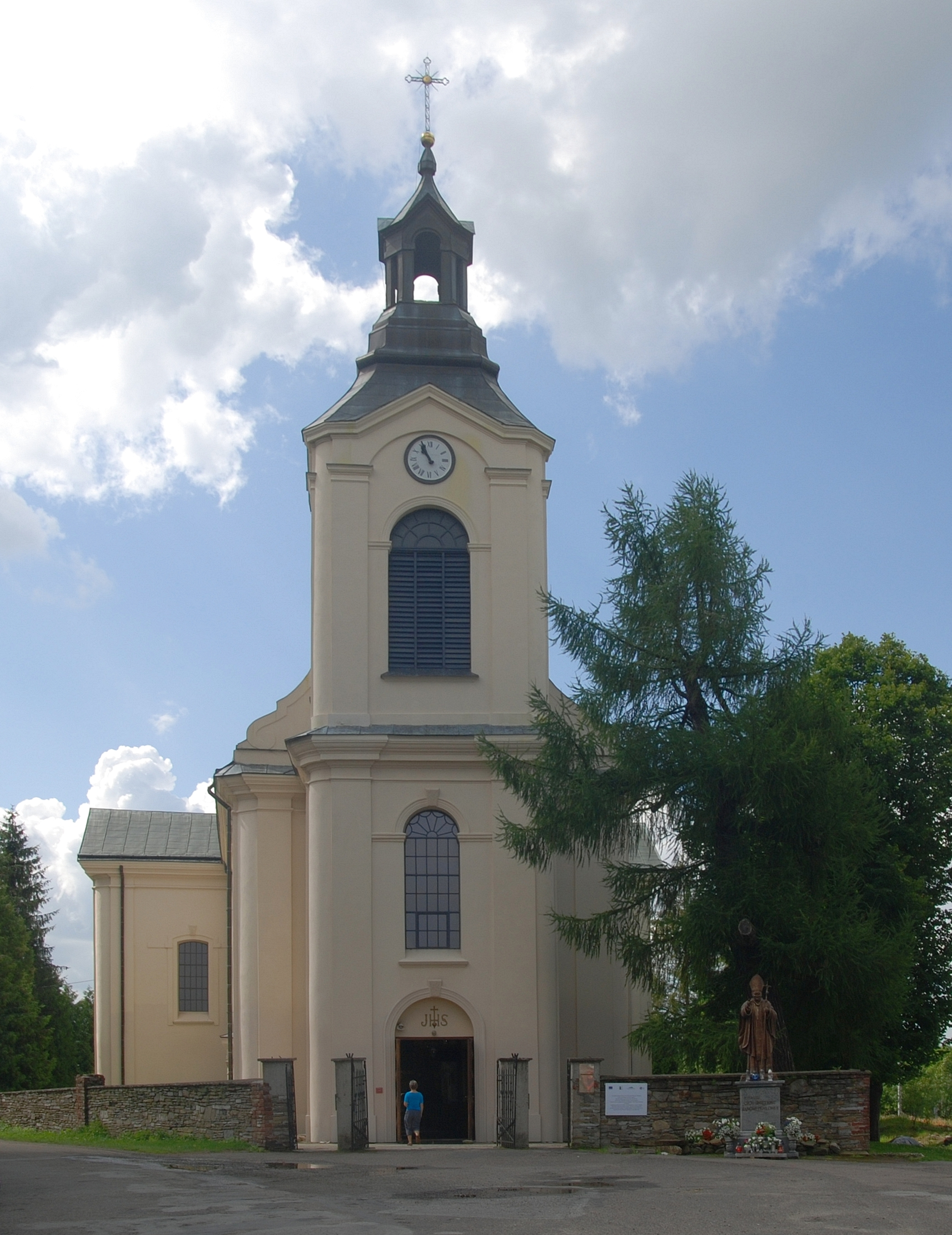 wieś Jaśliska